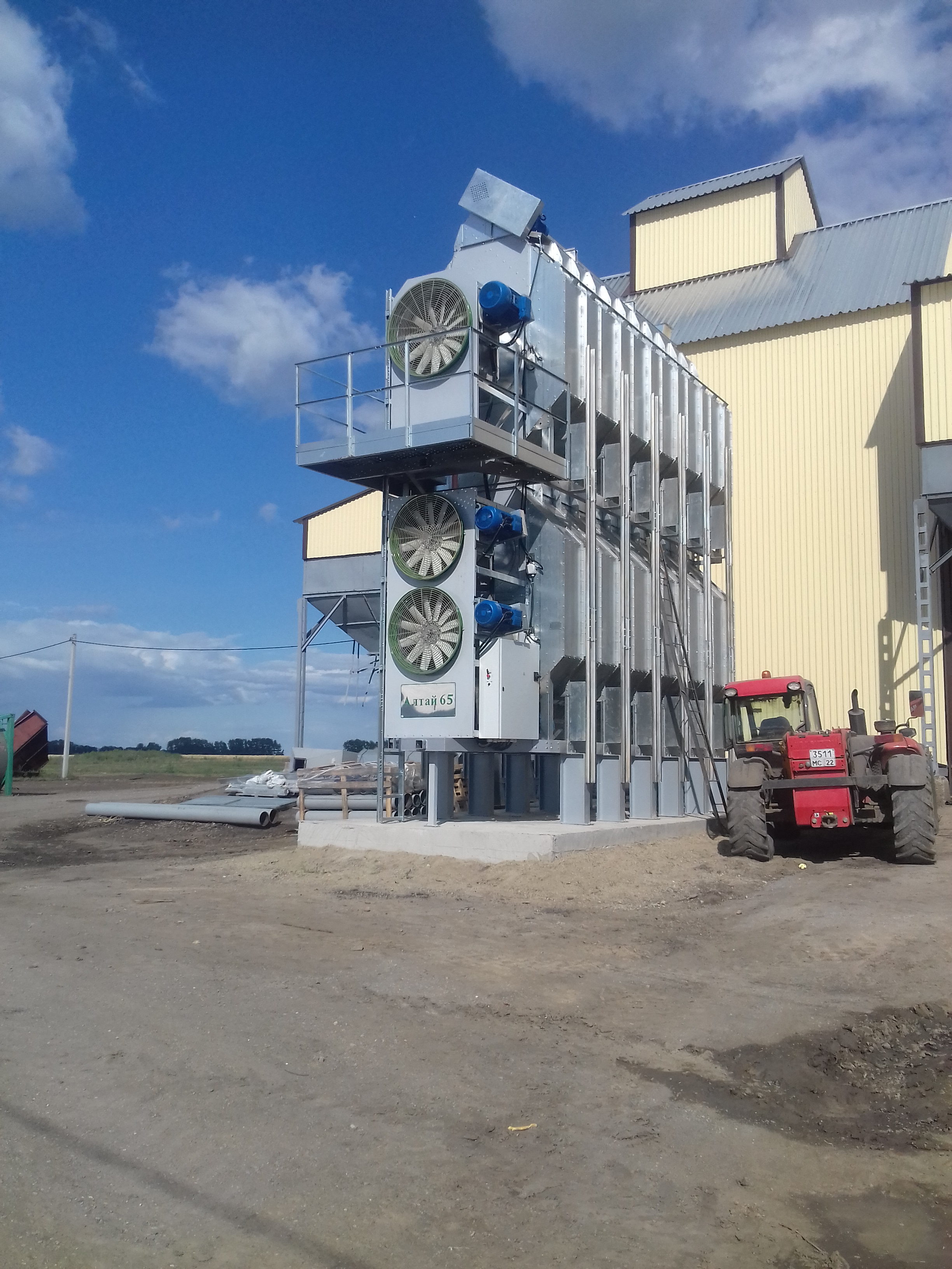 Зерносушилка Алтай-65